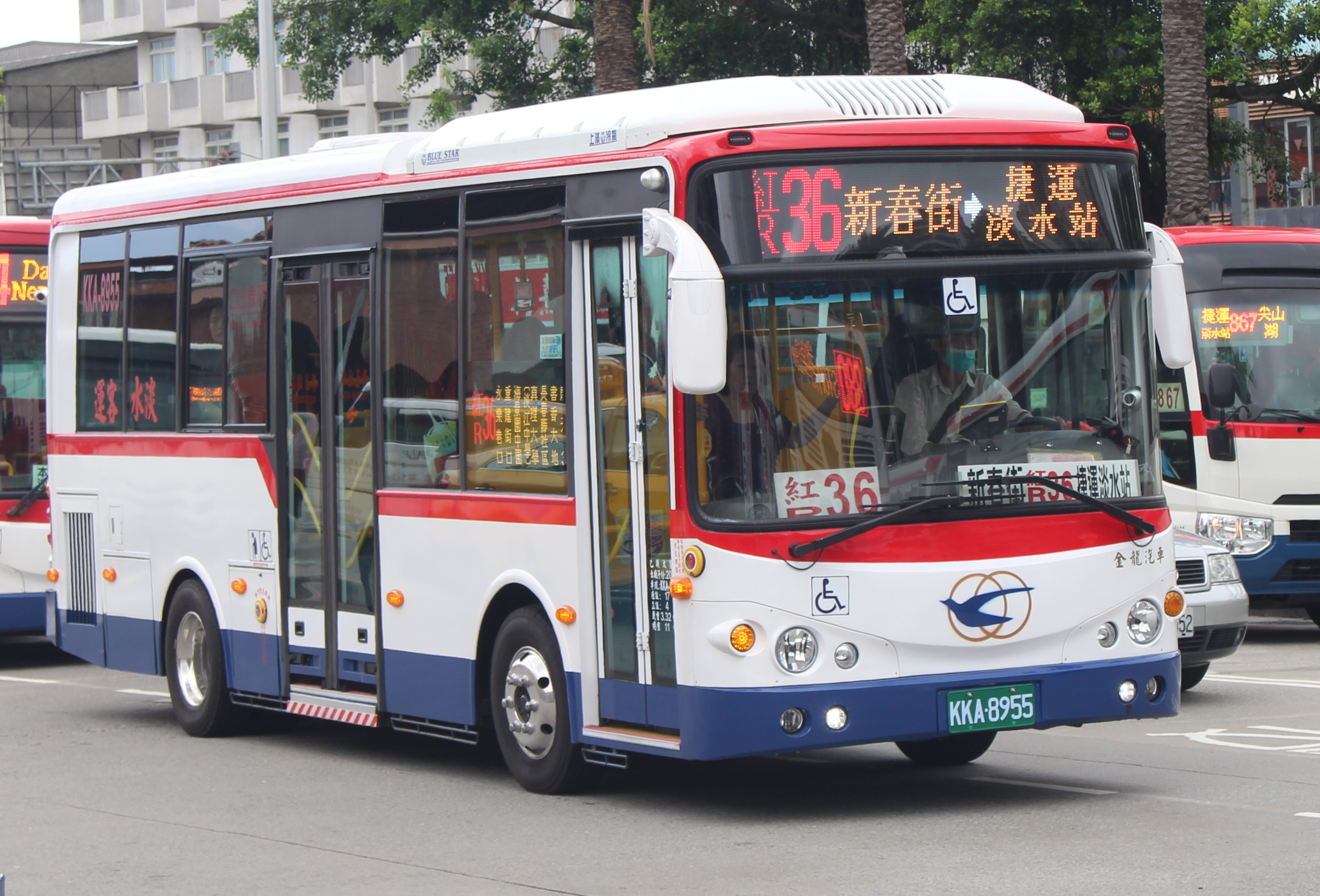 淡水客運KKA-8955 紅36 KINGLONG KL6850A2